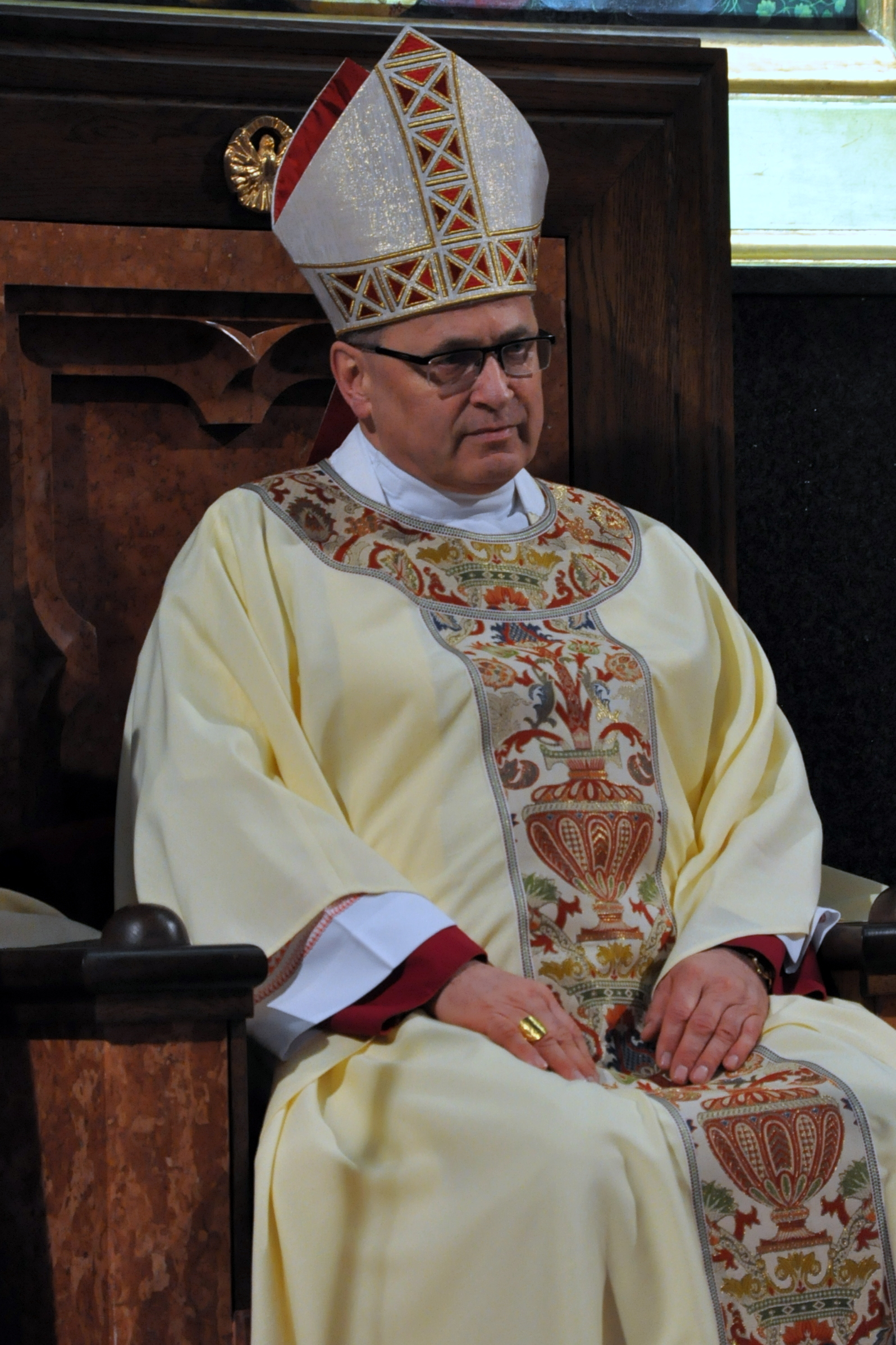 Wiesław Alojzy Mering (ur. 10 grudnia 1945 w Żukowie) – polski biskup rzymskokatolicki, biskup diecezjalny włocławski od 2003.